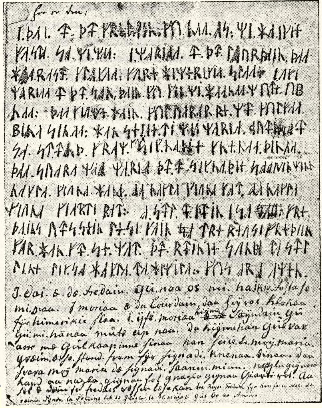 Illustrasjon av bøna Fredagsvessen. Henta frå manuskriptet «Gudsdyrkelse og korssamlinger» av Sivert Aarflot (1759-1817).